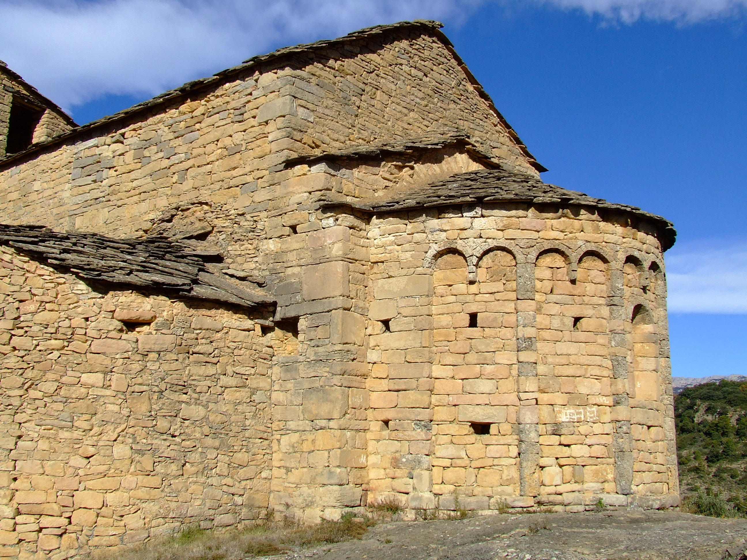 La capçalera de Sant Andreu de Biscarri (Biscarri, benavent de la Conca, Isona i Conca Dellà, Pallars Jussà)